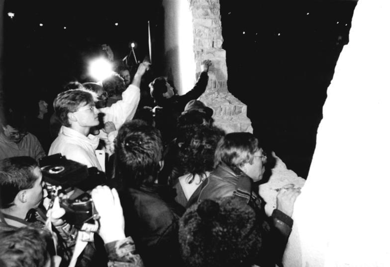 ADN-ZB- Roeske 11.11.89 Berlin: Eine große Menschenmenge beobachtete in den Abendstunden des 10.11.89 die Arbeiten zur Errichtung des neuen Grenzüberganges Eberswalder Strasse, der für den Reiseverkehr am 11.11.89 übergeben wurde.